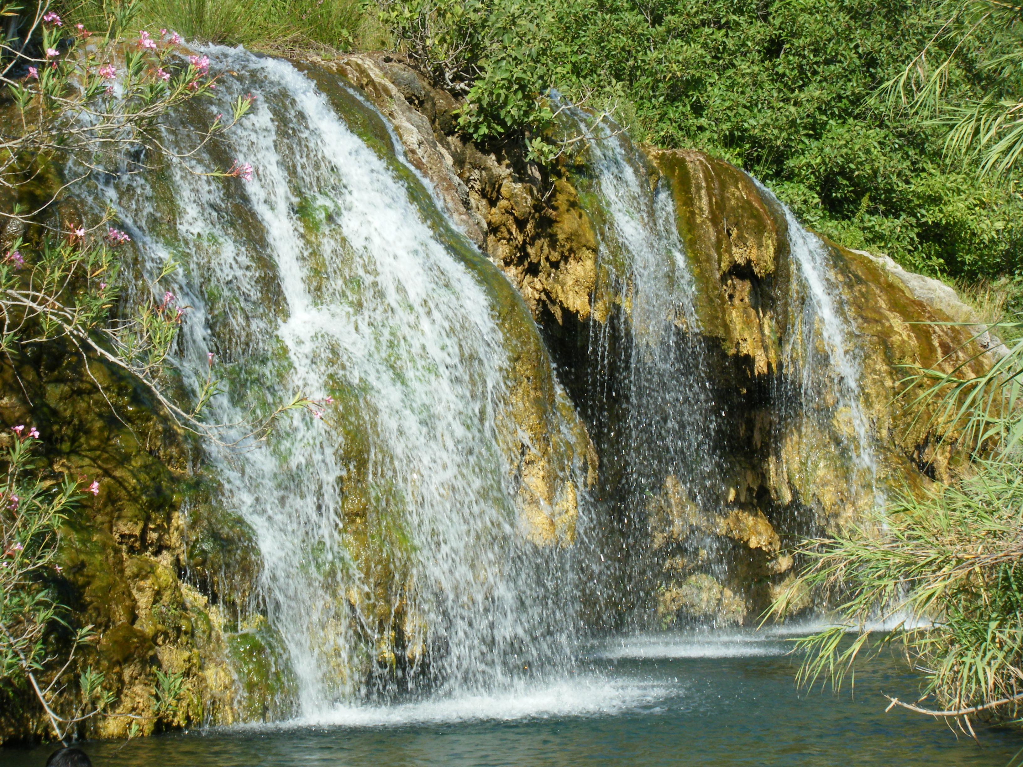 Paraje Natural sita en el Parque Natural Chera-Sot de Chera (Valencia, España) en el que poder disfrutar de unas vistas maravillosas